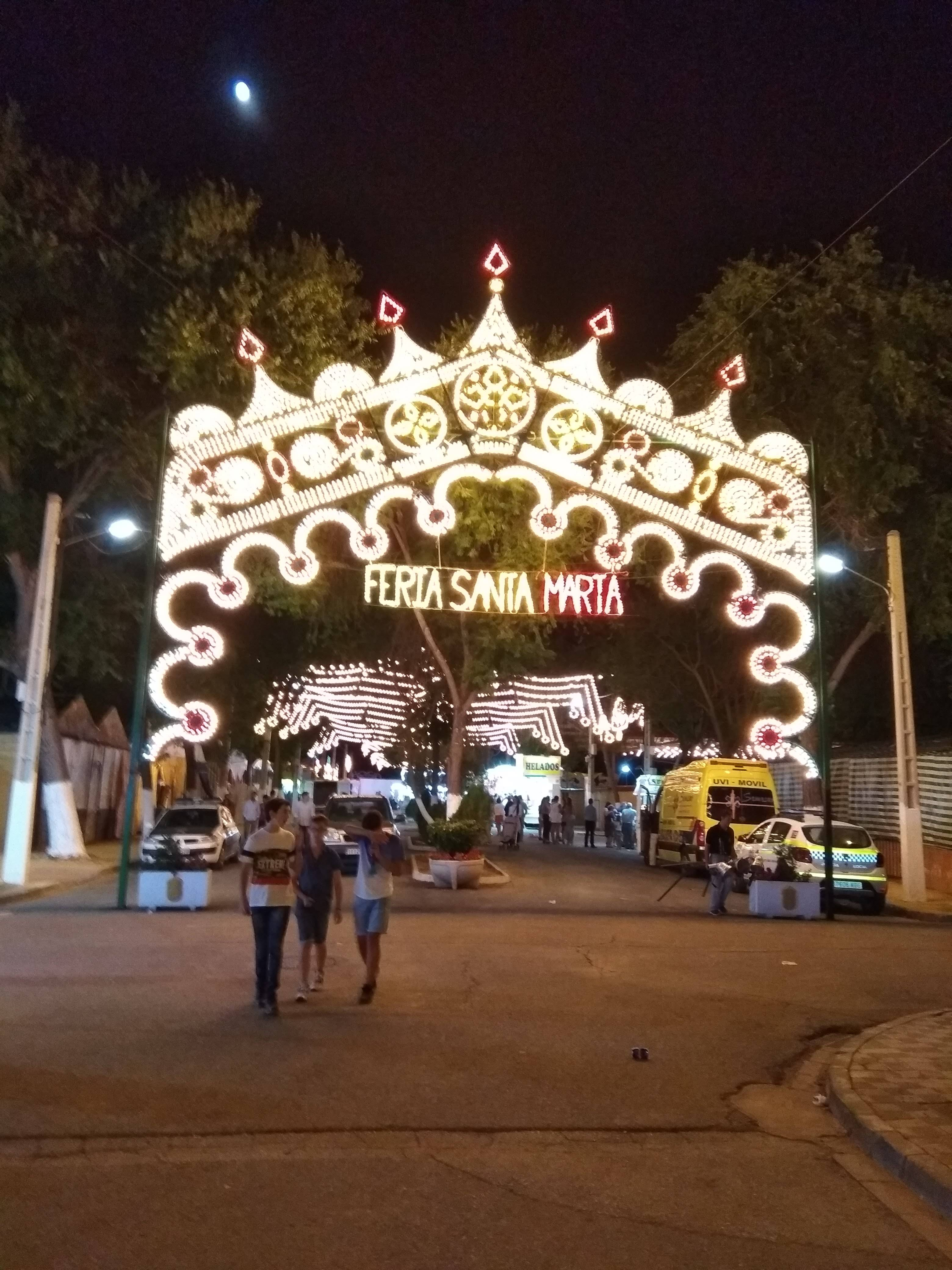 portada de la feria de los molares en 2018